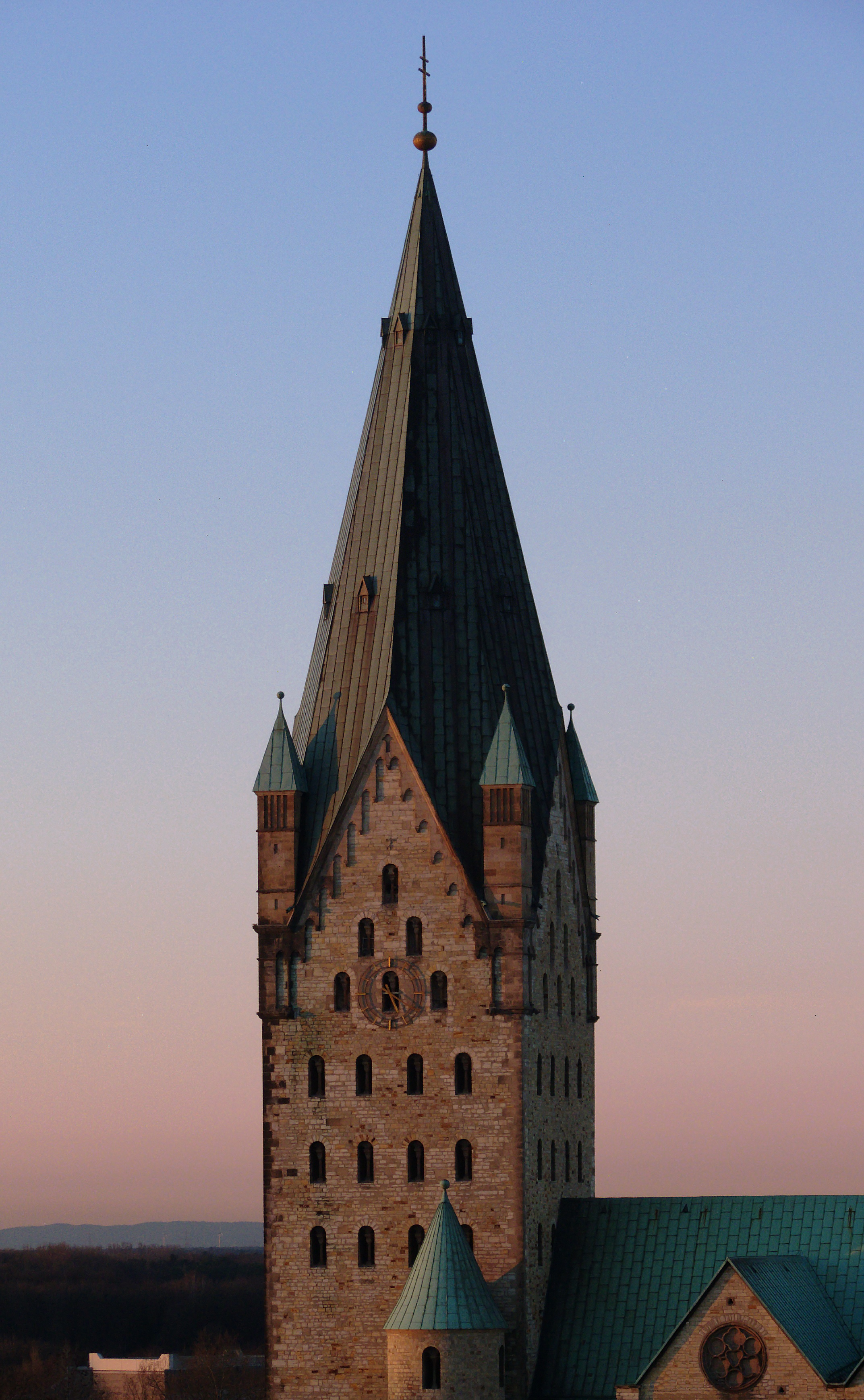 Turm des Paderborner Doms vom Parkdeck der Libori Gallerie aus gesehen.